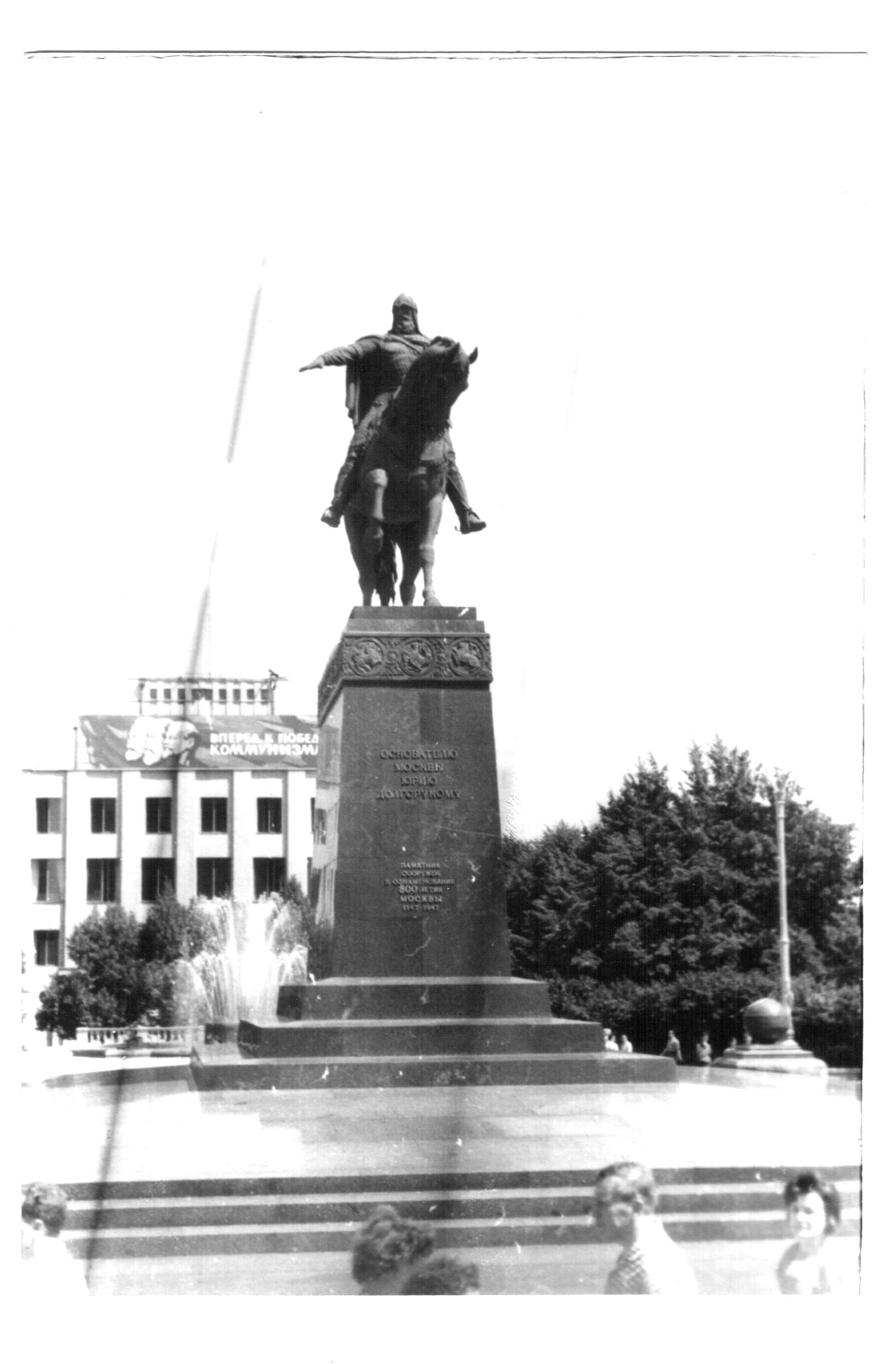 Live from the 29th of June, 1966. Visitors waiting for access to the Lenin Mausoleum (1). At the Lenin Mausoleum (3)Students of the Szinyei Merse Pál Secondary School (Budapest, Terézváros) set out for a tour in the USSR. The journey took one and a half day from Budapest to Moscow. 32 kids, 2 teachers. Published under Creative Commons in the Metapolisz DVD line. A felvételek 1966. Június 29 –től készültek. A Szinyei Merse Pál Gimnázium osztályának 32 diákja két tanárral a Szövjetúnióba utaztak. Július elsején érkeztünk Moszkvába, a Kijevi Pályaudvarra. Összövetségi Kiállítás, Űrhajós Múzeum, Cirkoráma Filmszínház, Találkozó egy szovjet Kutatóintézet fiataljaival. Július 2: Városnézés, hajókirándulás a Gorkíj Parkig, Óriáskerék, Metró, Lenin Mauzóleum, Kreml, Gorkíj utca, GUM (Goszudartvennij Univermag Magazin, Állami Áruház), Bolsoj: Figaró. Július 4: Leningrád: Fegyvertár, Lomonoszov Egyetem, Moszkva folyó, Július 5: Ermitázs, Téli Palota Július 6: Forradalmi Múzeum ahol levetítették a gyerekeknek a „Leningrád hőstette” című filmet, Hősök temetője, Izsák Székesegyház, Ladoga Szálló Közzétéve Creative Commons alatt a Metapolisz DVD sorozatban.